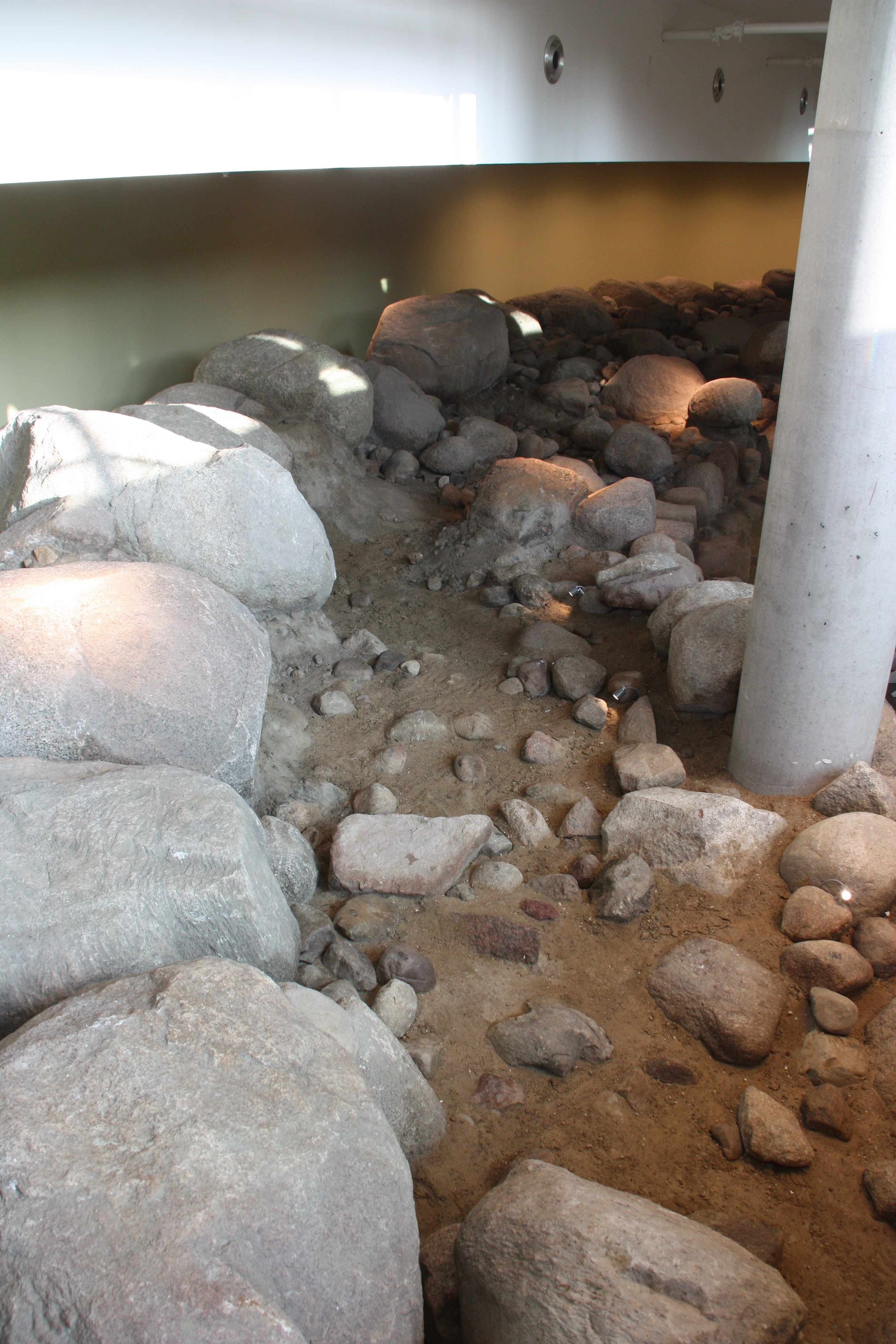 Hamburg, Bischofsturm, GrundmauernThis is a photograph of an architectural monument.